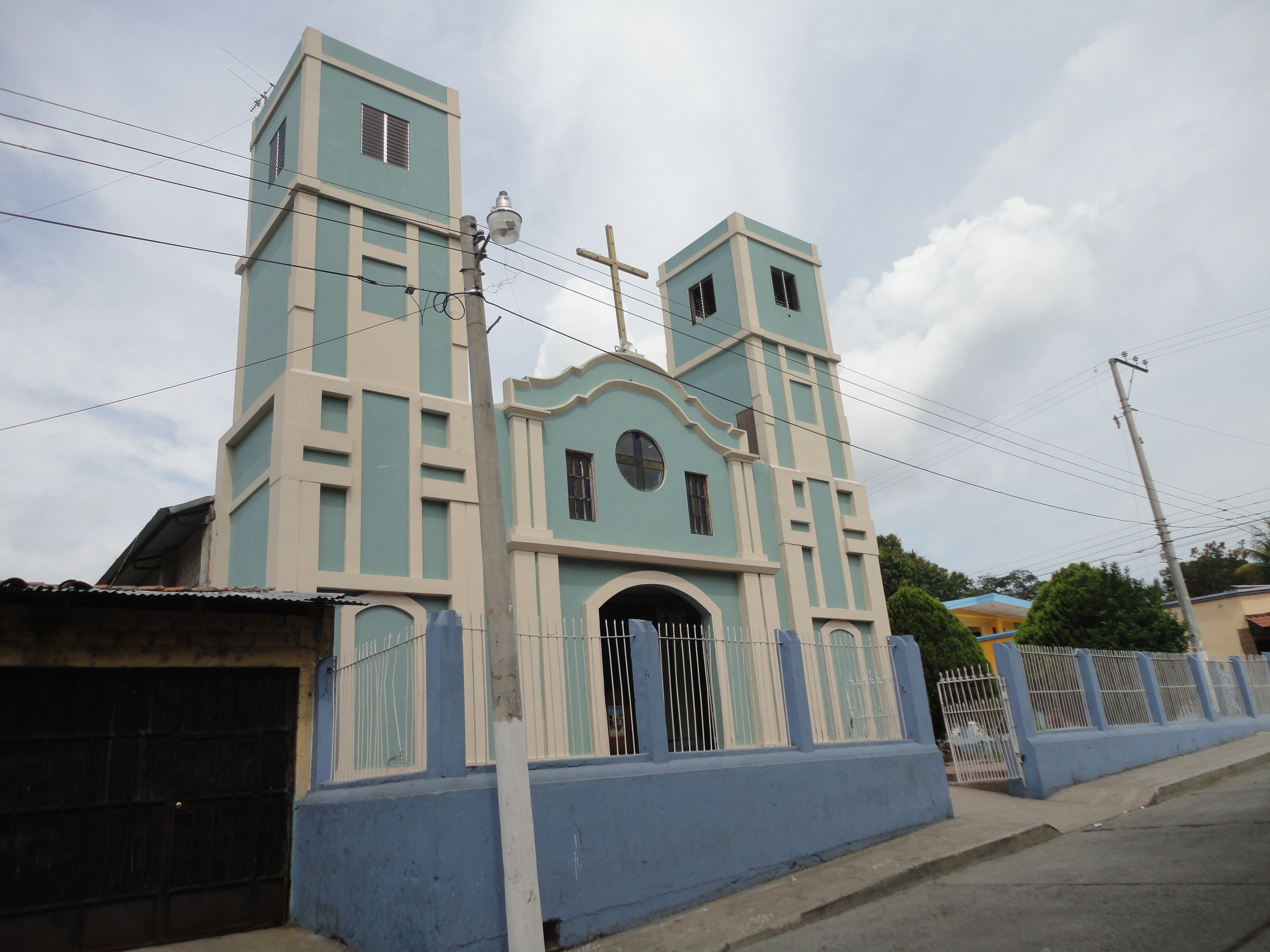 Iglesia de San Esteban Catarina, San Vicente